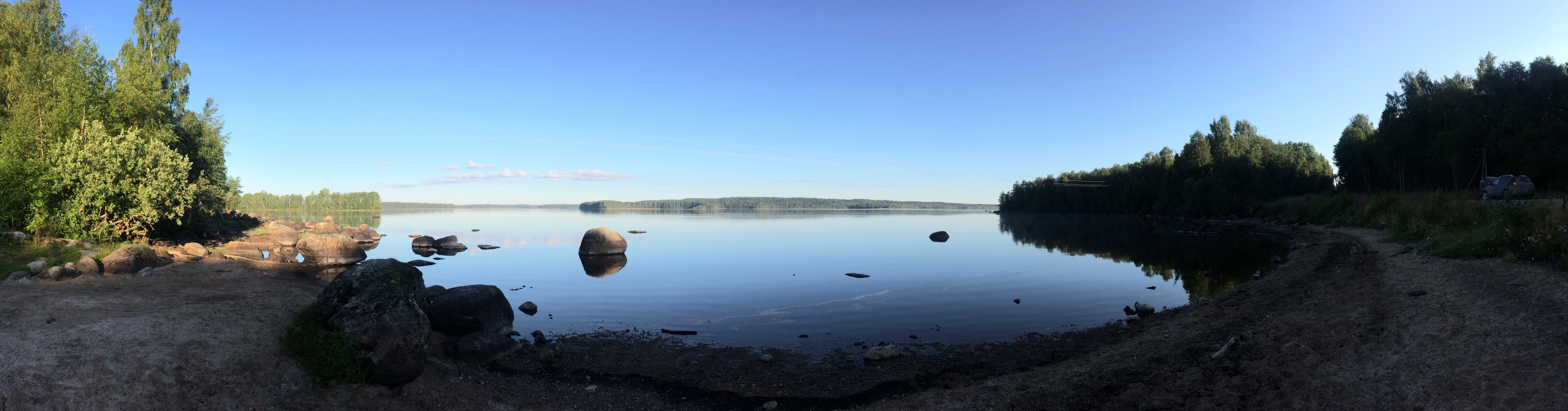 Салонъярви